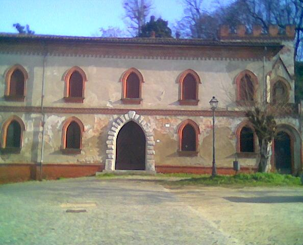 Monumento di incisa scapaccino